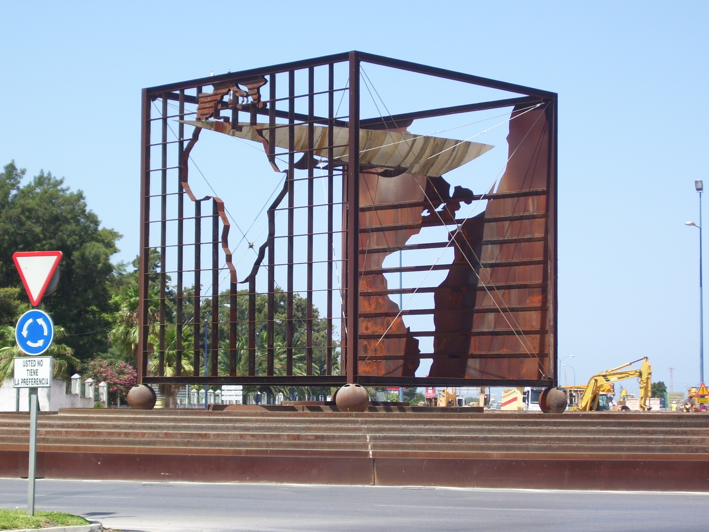 Foto del "Monumento de la comunicación", obra del arquitecto catalán Óscar Tusquets, conocida popularmente como "Fuente oxidá", sita en la salida a Cádiz desde la ciudad de San Fernando (Cádiz, España).